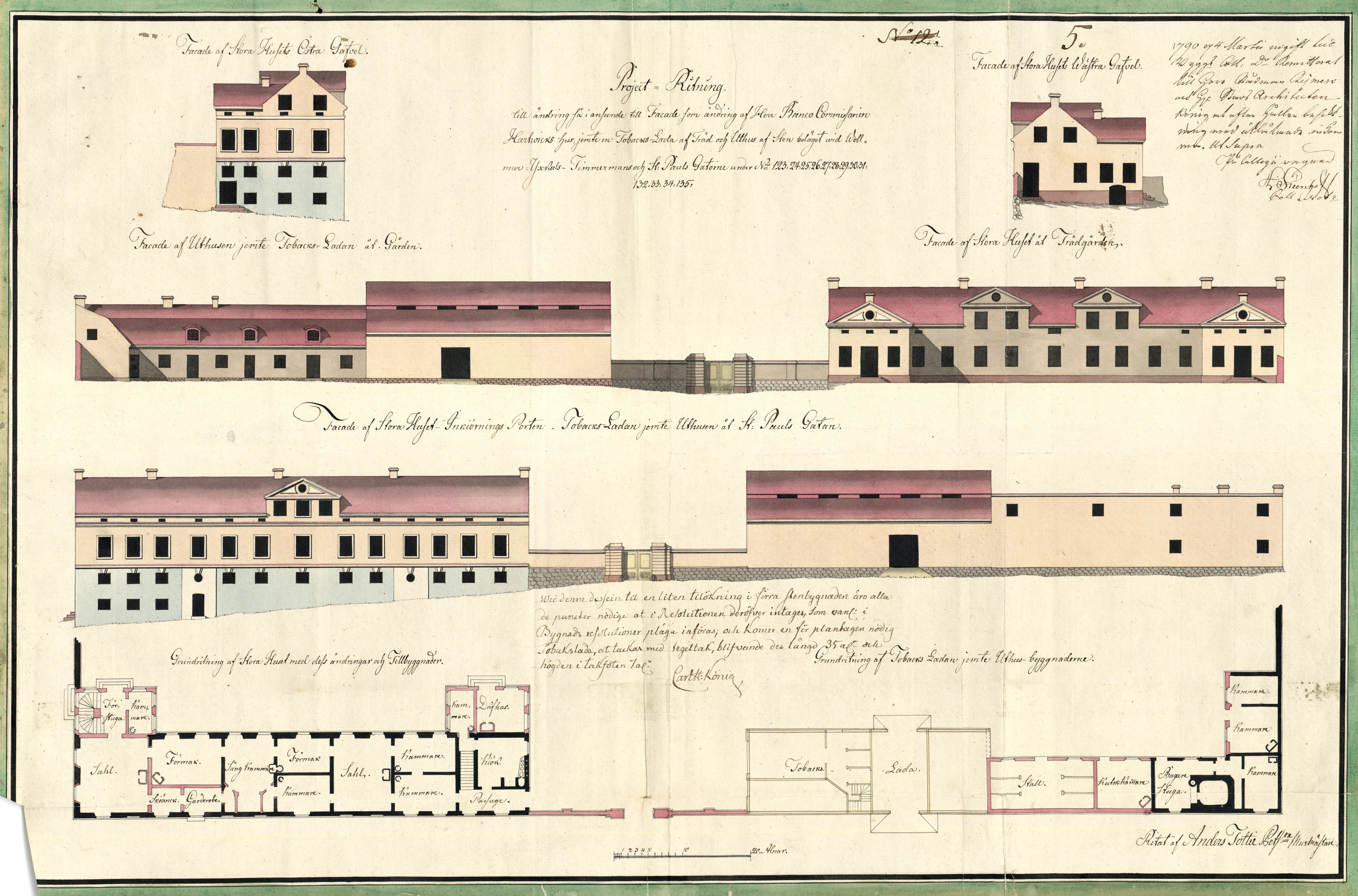 Ritning till Bancokommissarie Hartwicks hus